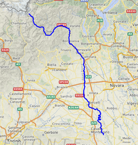 carte réalisée sur umap This map may be incomplete, and may contain errors. Don't rely solely on it for navigation.